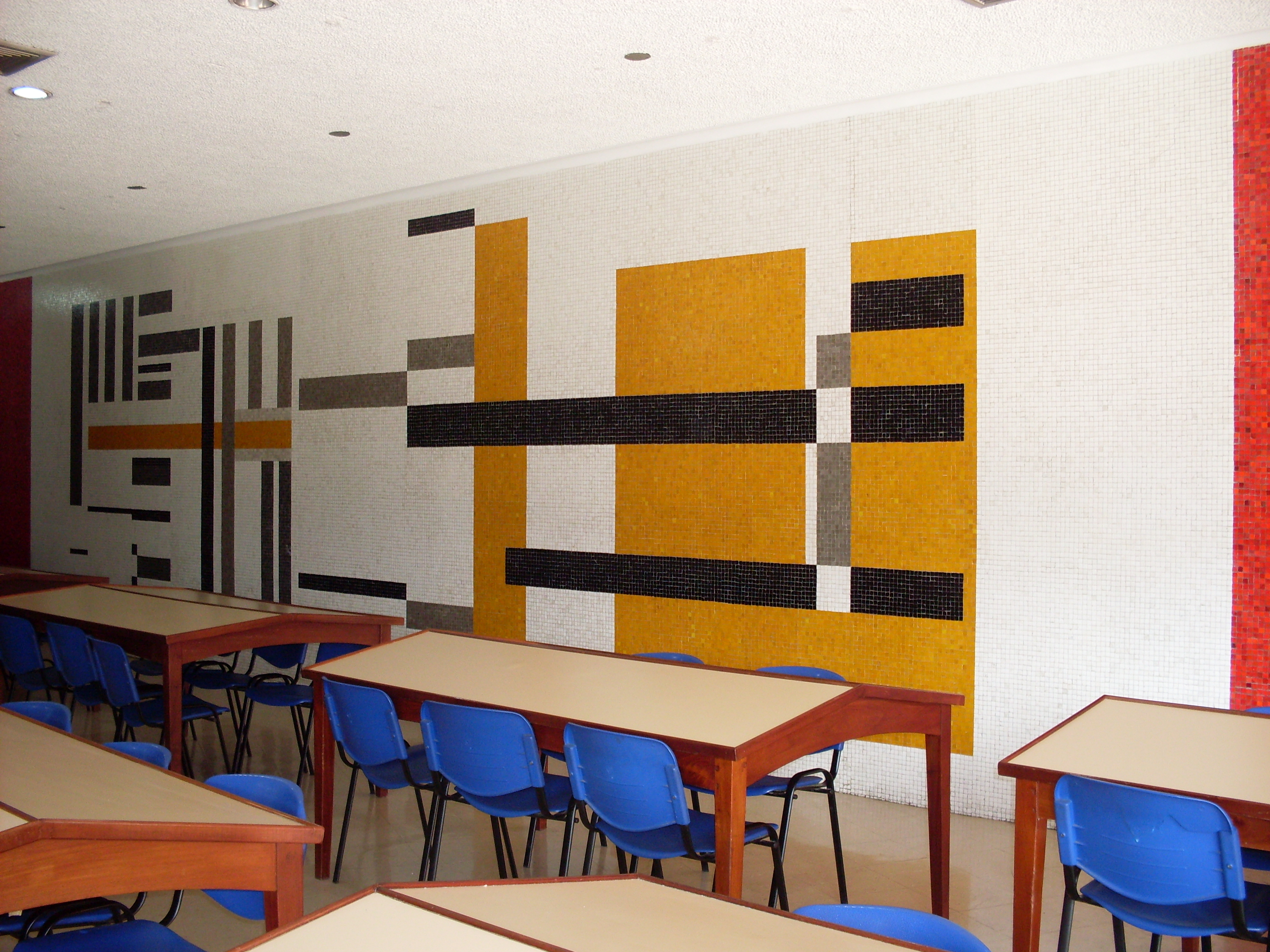 Mural de Carlos González Bogen. Título: Sin título. Autor: Carlos González Bogen. Año: 1954. Ubicación: Universidad Central de Venezuela, Edificio de la Biblioteca Central, piso inferior, sala de lectura